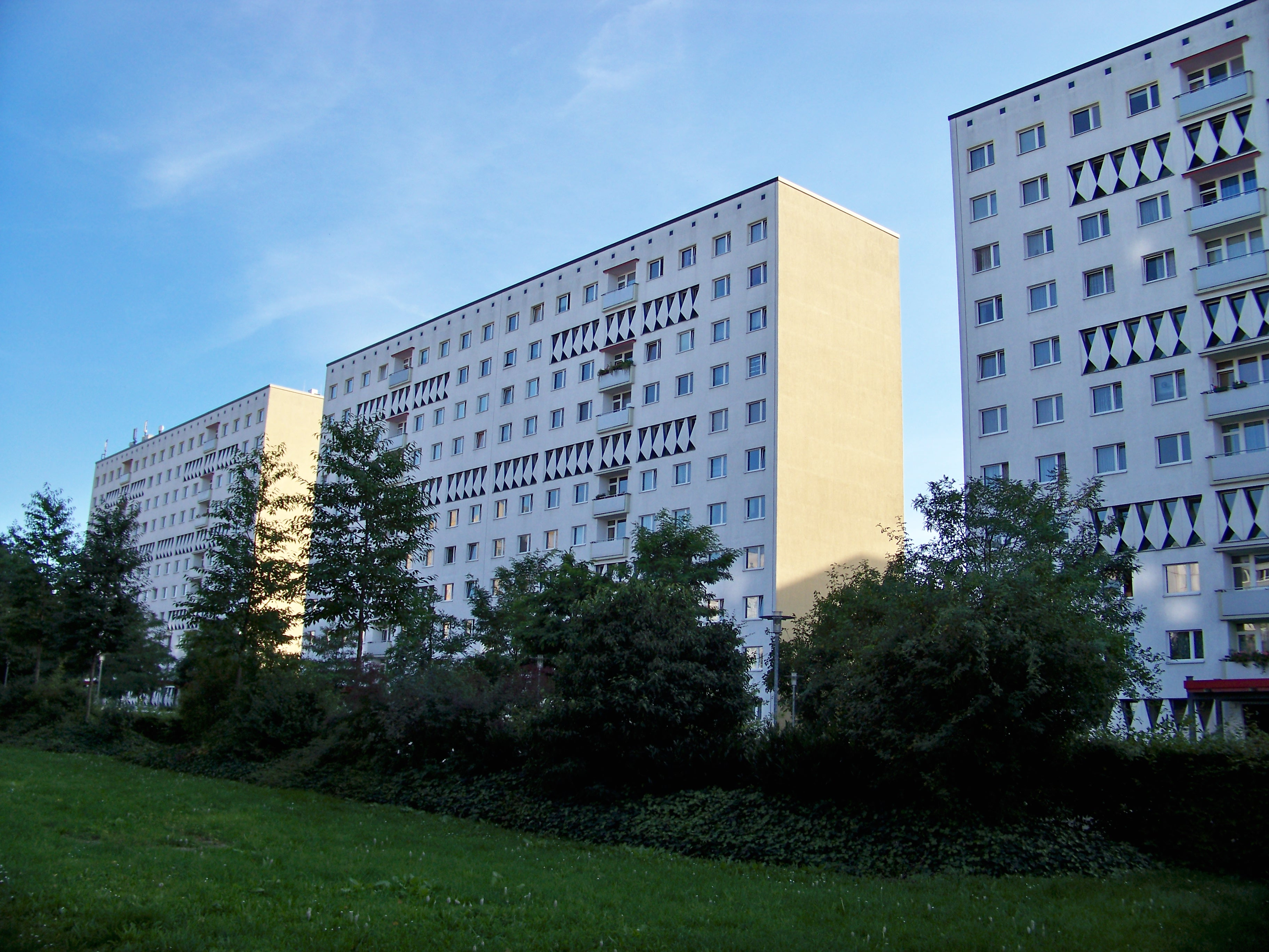 Plattenbauhochäuser in der Straße des 18. Oktober in Leipzig. Es handelt sich um einen Plattenbau des Typs P2 in Sonderkonstruktion.